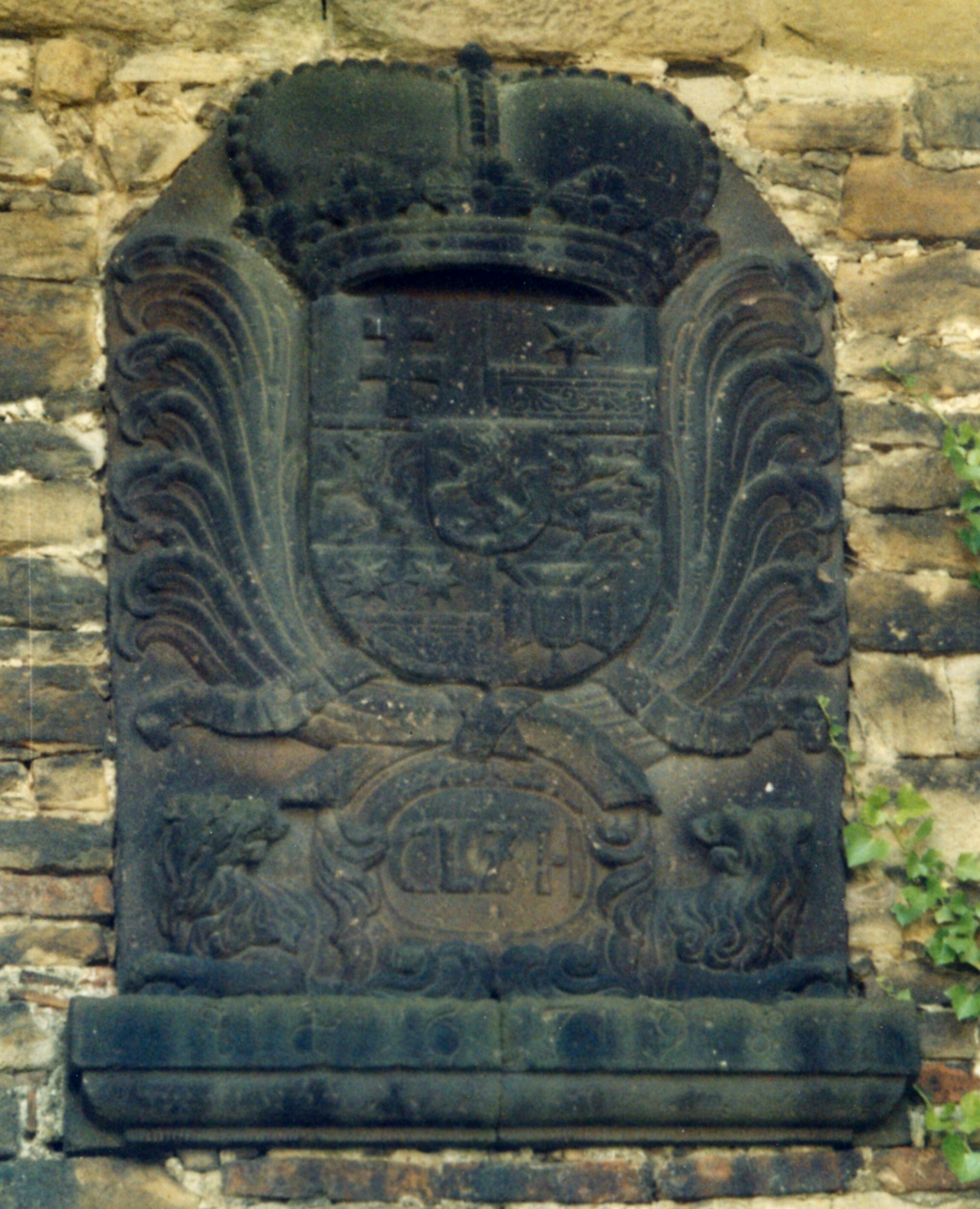 Bildbeschreibung: Messinghof (Kassel) - landgräflich-hessisches Wappen Quelle: privat Fotograf/Zeichner: Albert Gronau, Kassel Datum: Juli/August 2003 Sonstiges: Mit freundlicher Genehmigung A. Gronau (siehe hier)